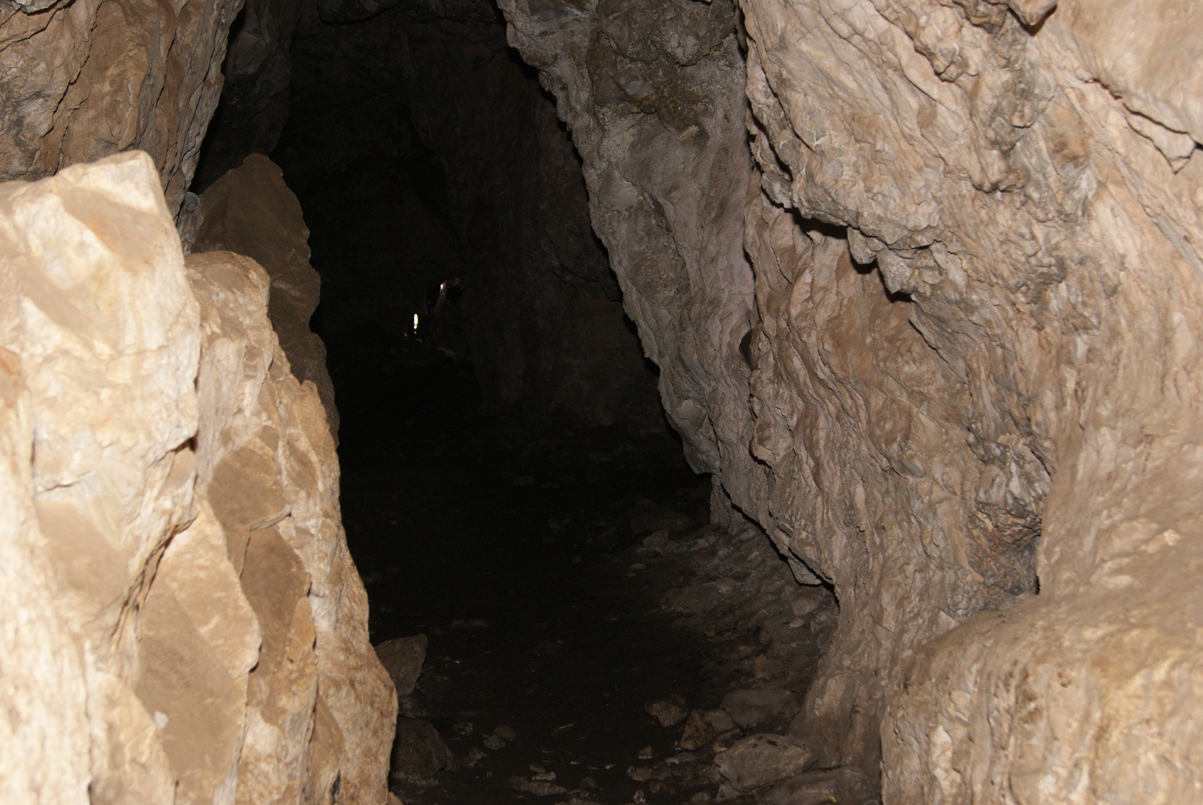 ورودی بزرگ غار علی شیخ که به انتهای غار دیگر راه ندارد